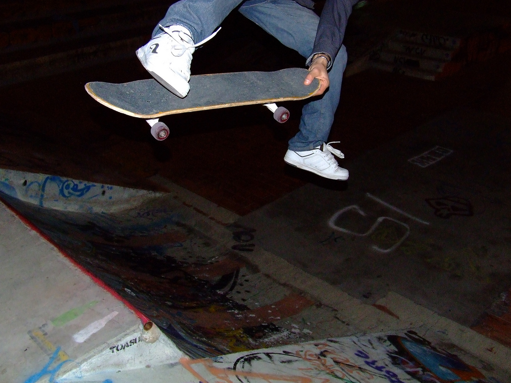 A skateboarder's jump in Cagliari, Italy.